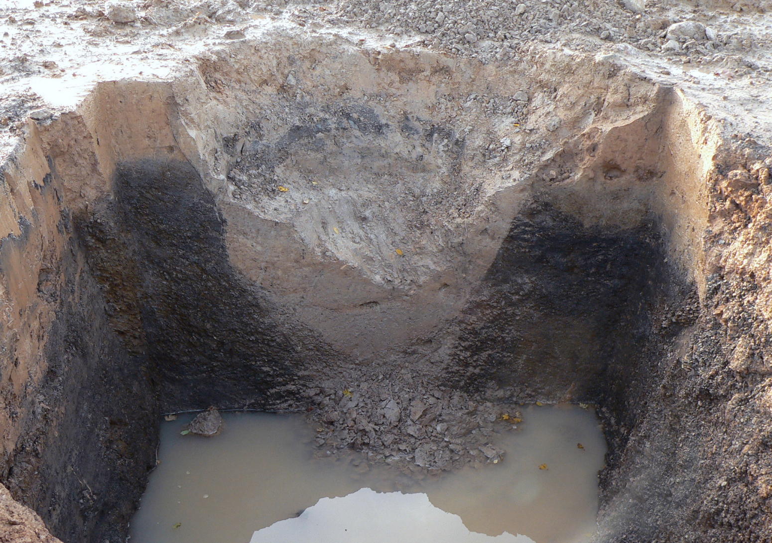 Freigelegte Vorratsgrube aus der Eisenzeit in dunklem Schottergrund